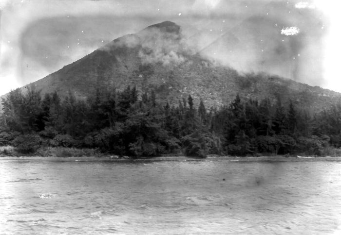 Negatief. Bebost strand aan de voet van de Krakatau